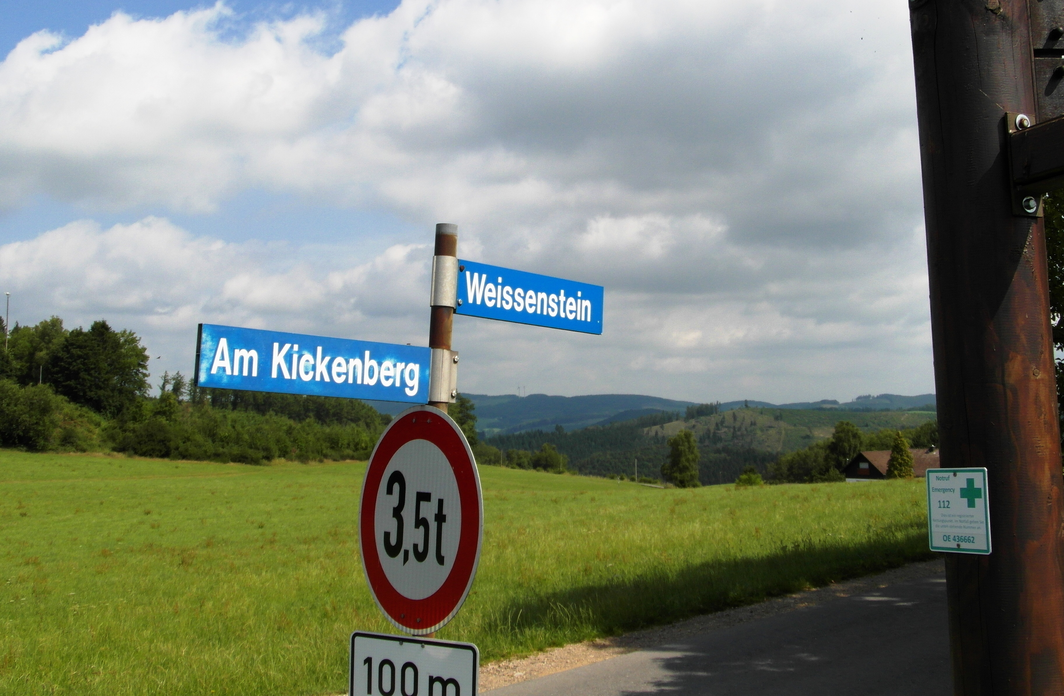 Hinweistafel auf das ehem. Bergbaugebiet Weißenstein an der Straße von Halberbracht nach Burbecke